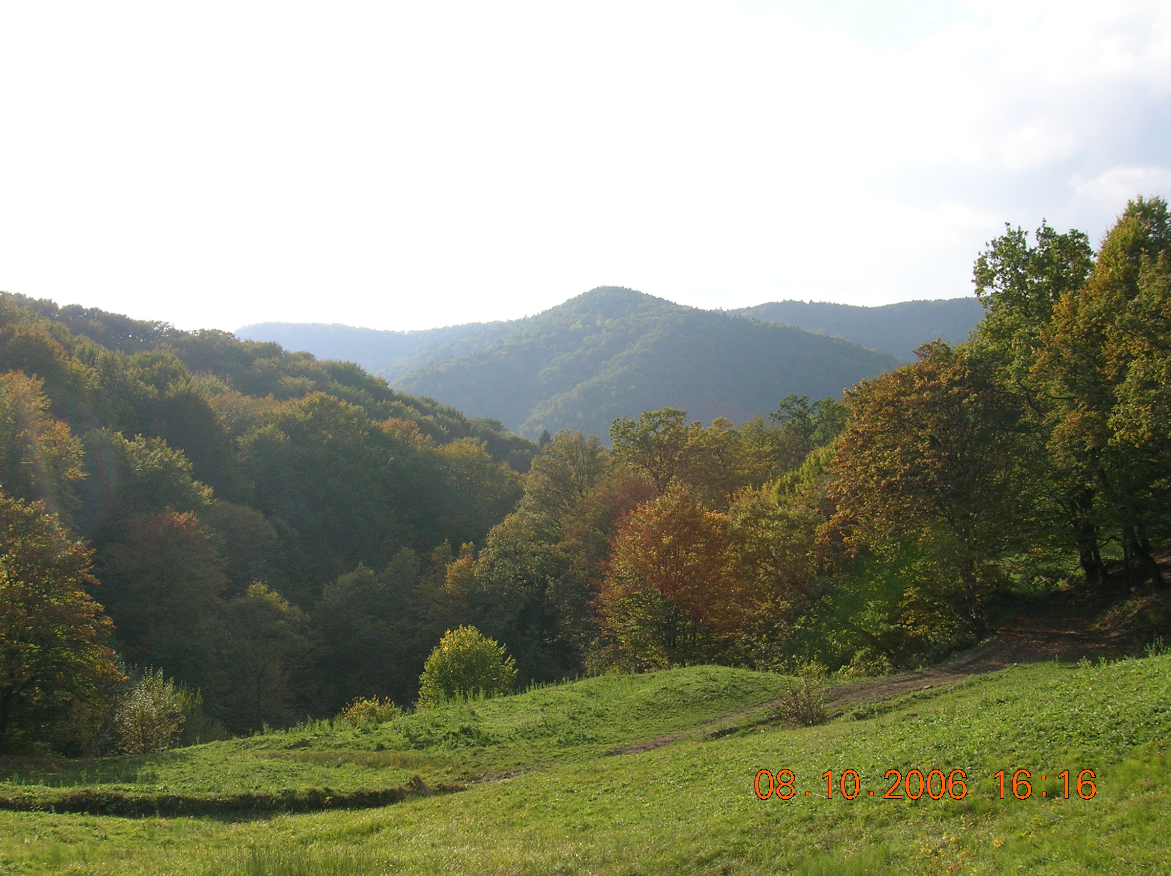 Munţii Tarcăului (Carpaţii Orientali, România)-De sub Cernegura spre Bahrin (valea Pârâului Doamna)